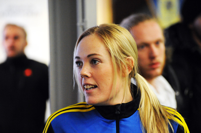 a_34_7570